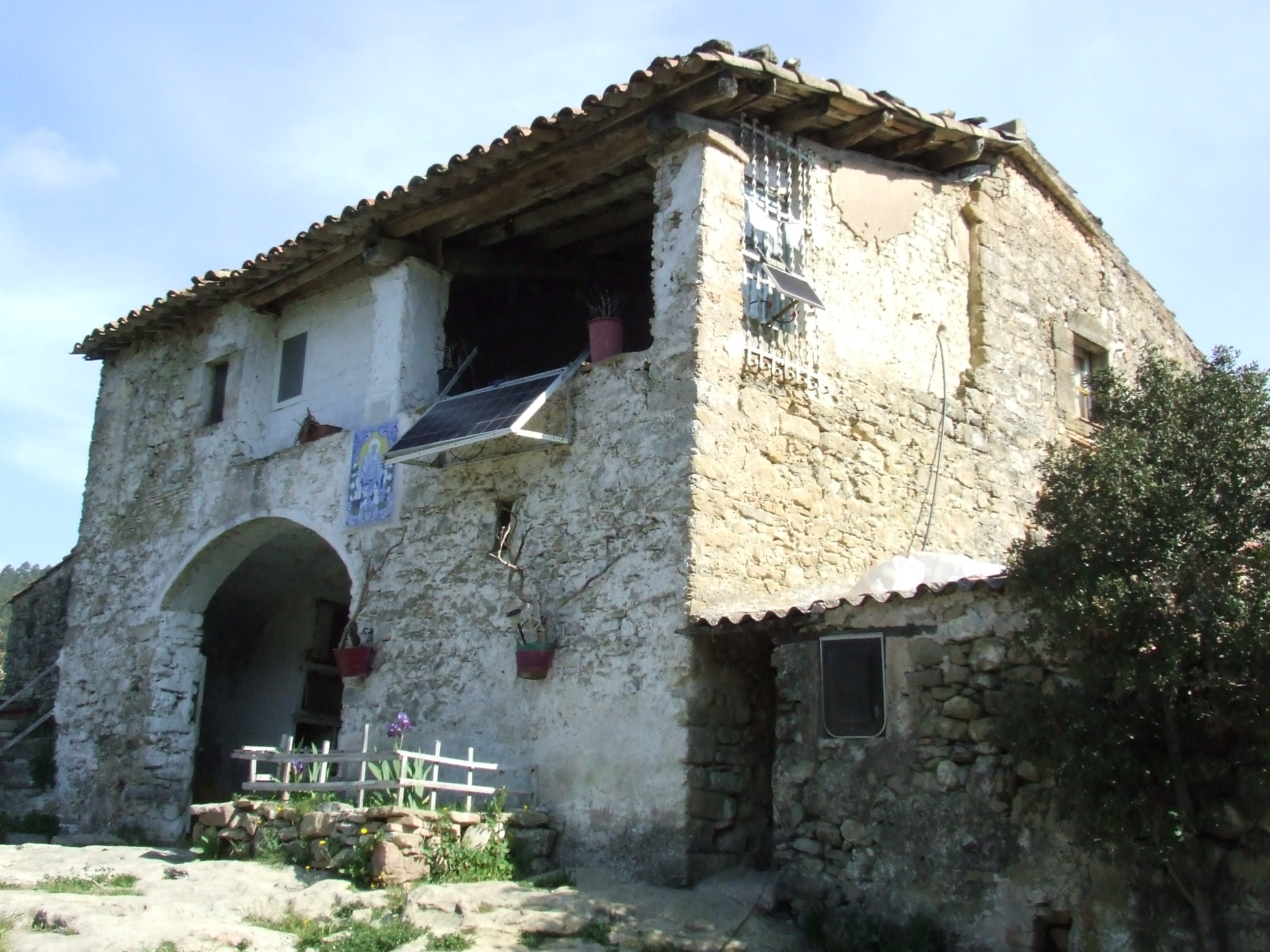 Façana meridional de la masia del Xei (Marfà, Castellcir, Moianès)